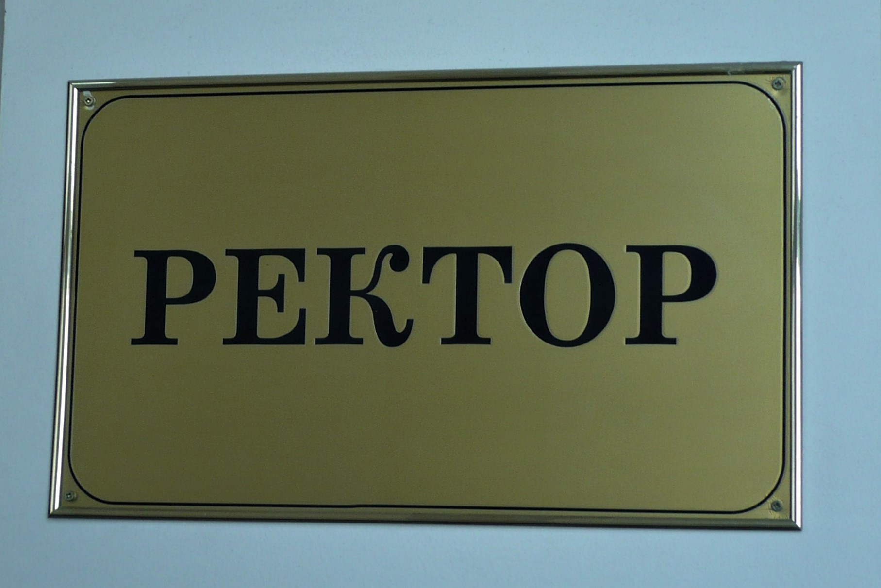 Lwowski Uniwersytet Narodowy im. Iwana Franki. Rektorat